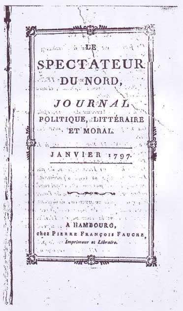 Couverture de l'exemplaire du journal Le Spectateur du Nord dirigé par Amable de Baudus et publié en 1797. More information